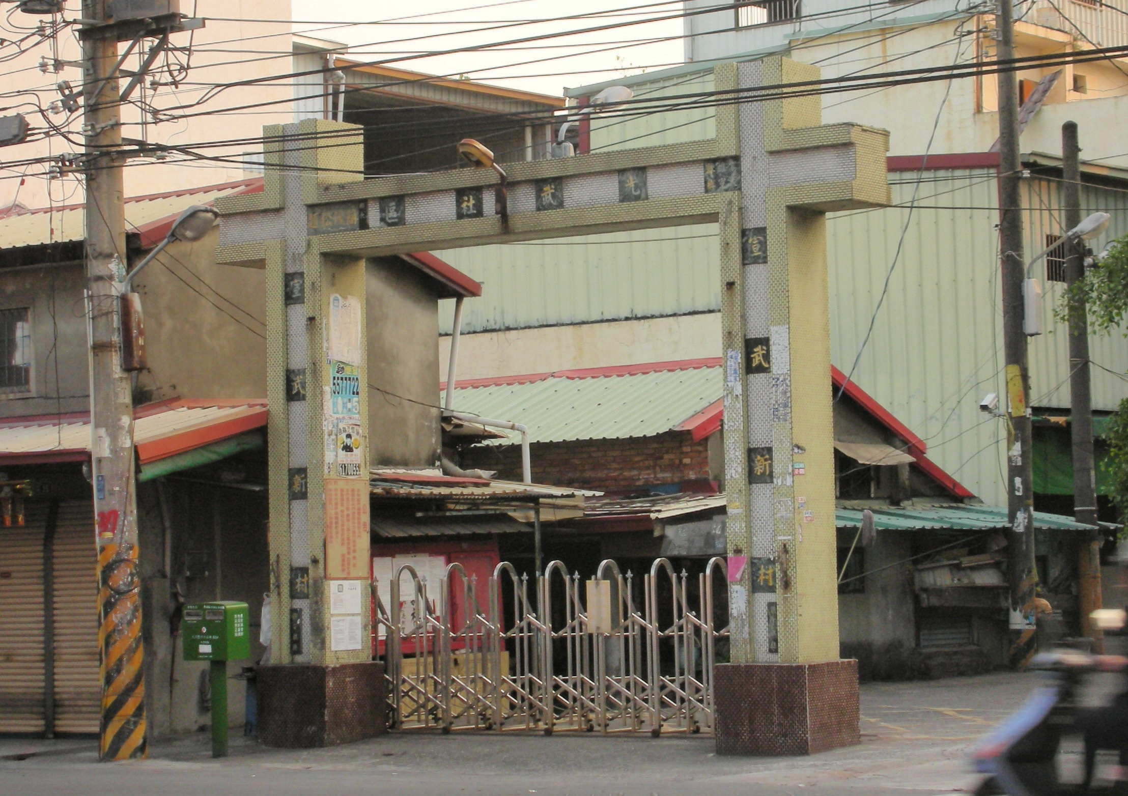 大寮區宣武新村大門 (2012)，現已拆除。